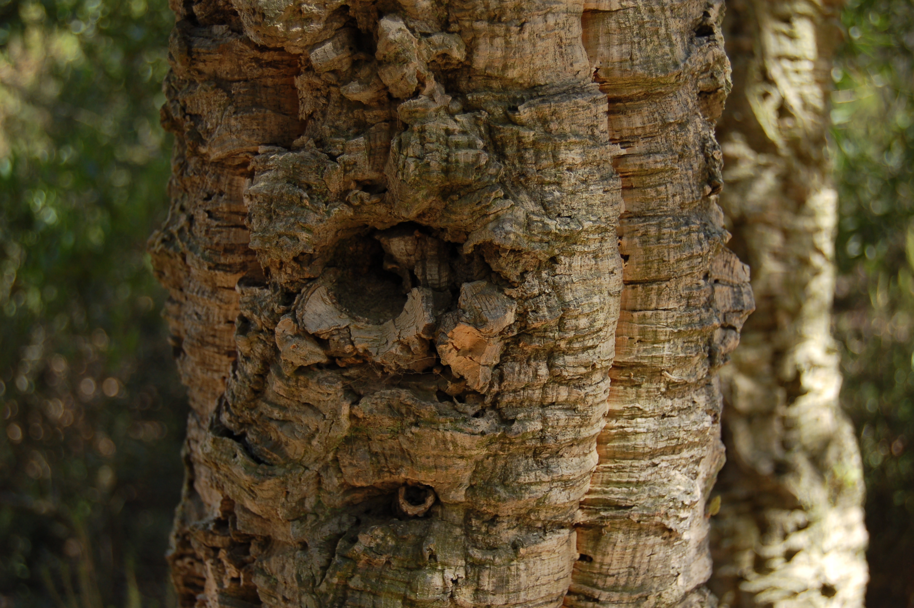 Chêne-liège sur l'île de Porquerolles